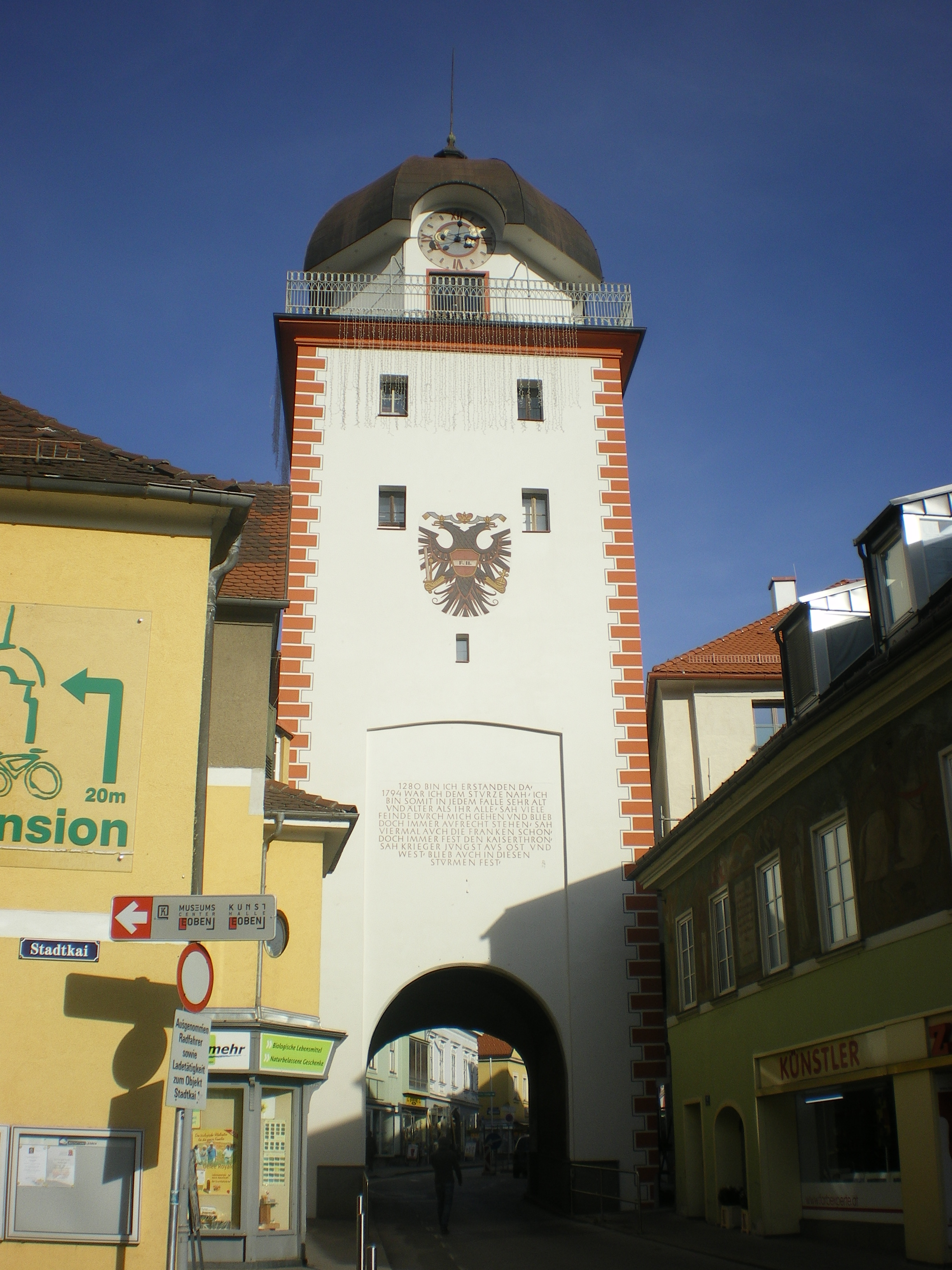 Blick auf den Schwammerlturm von der Murseite